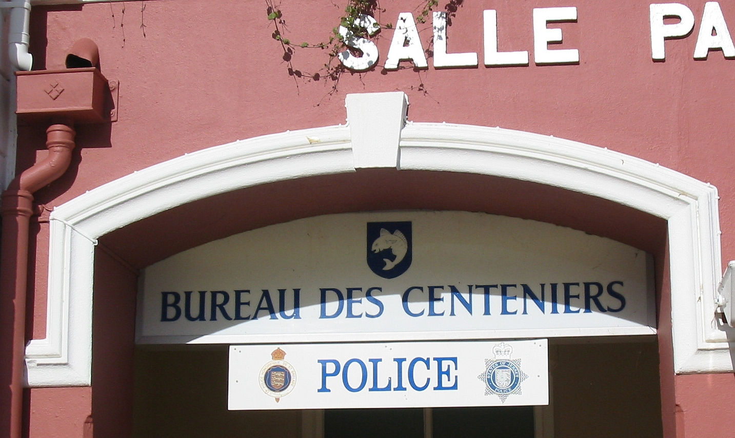 Nrf: Jèrri